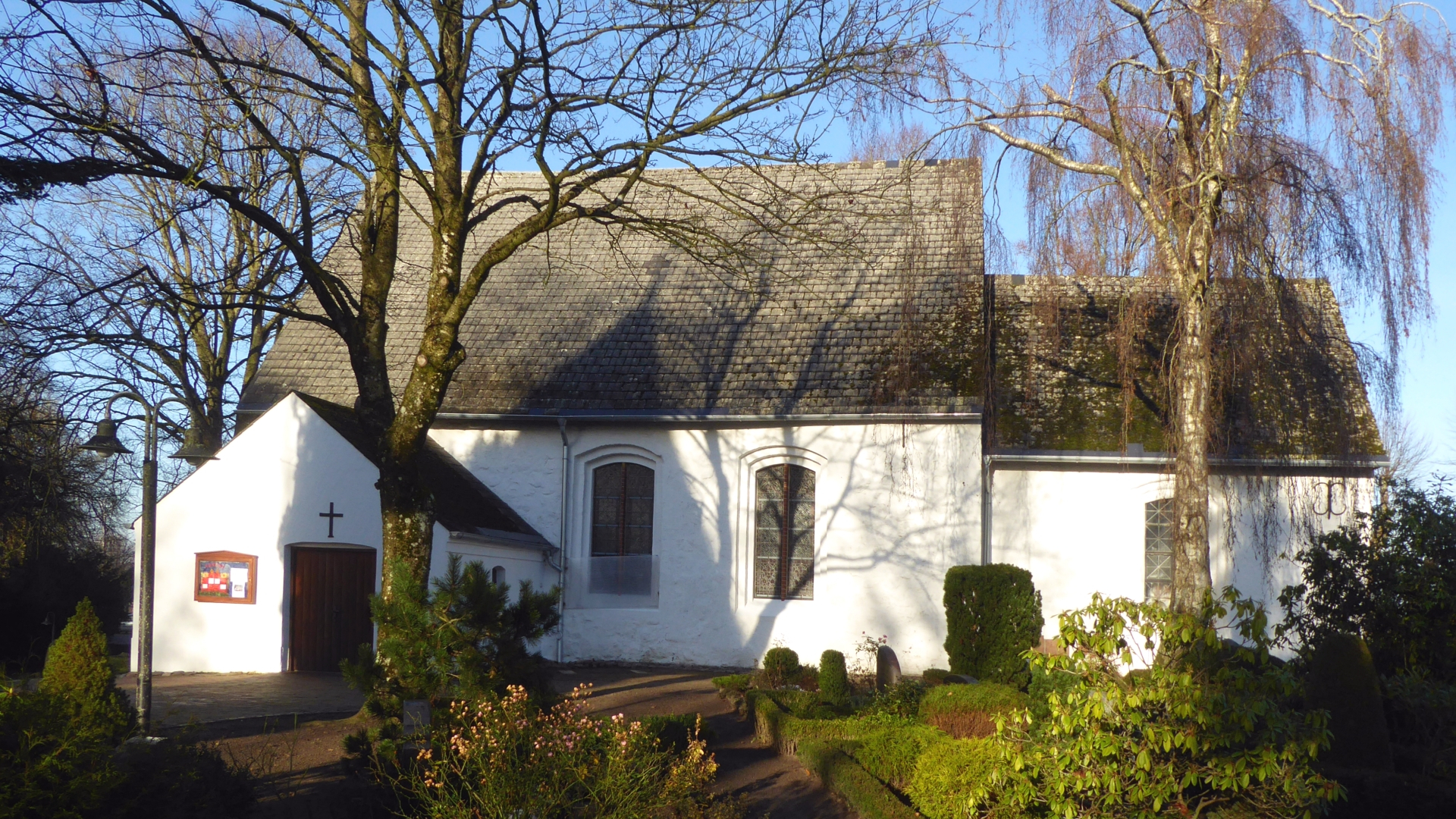 Struxdorf St.-Georgs-Kirche aus Feldstein- und Natursteinquadermauerwerk mit einem Backsteinanbau. Errichtet 13. Jahrhundert Foto 2018 Wolfgang Pehlemann P1280489